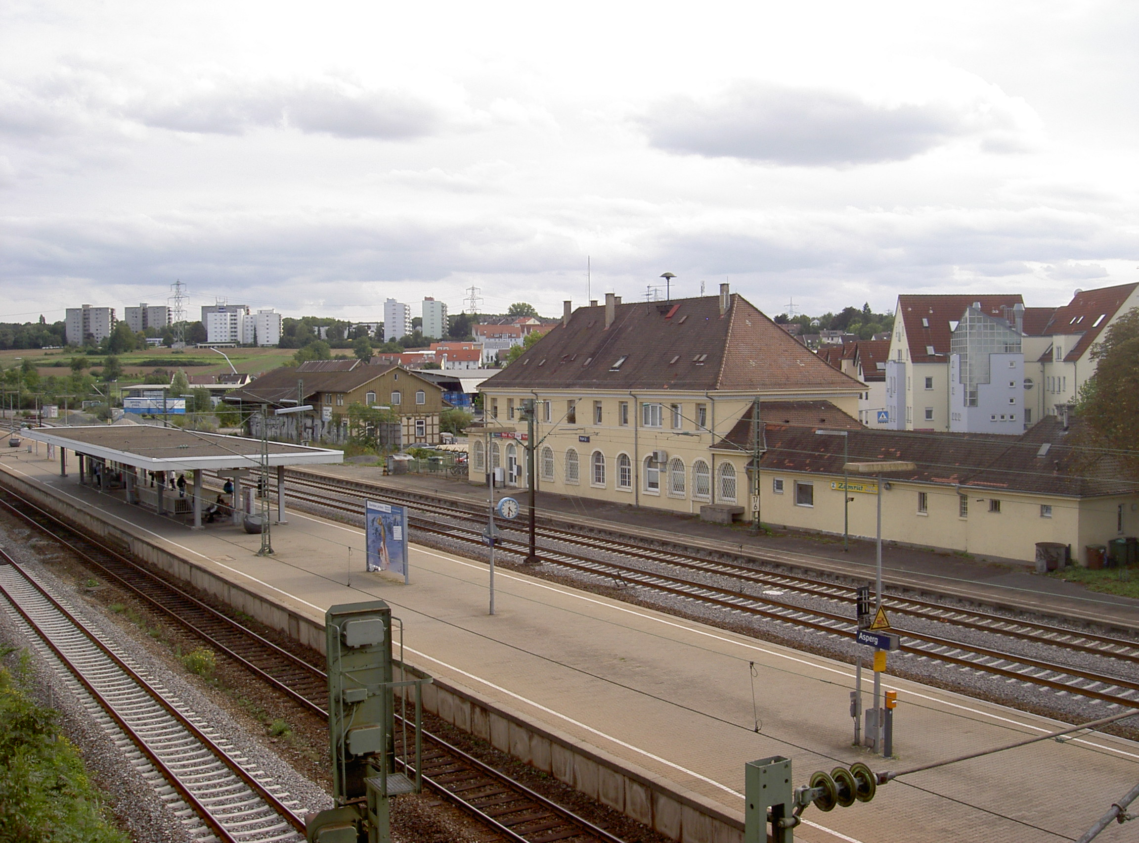 Bahnhof Asperg